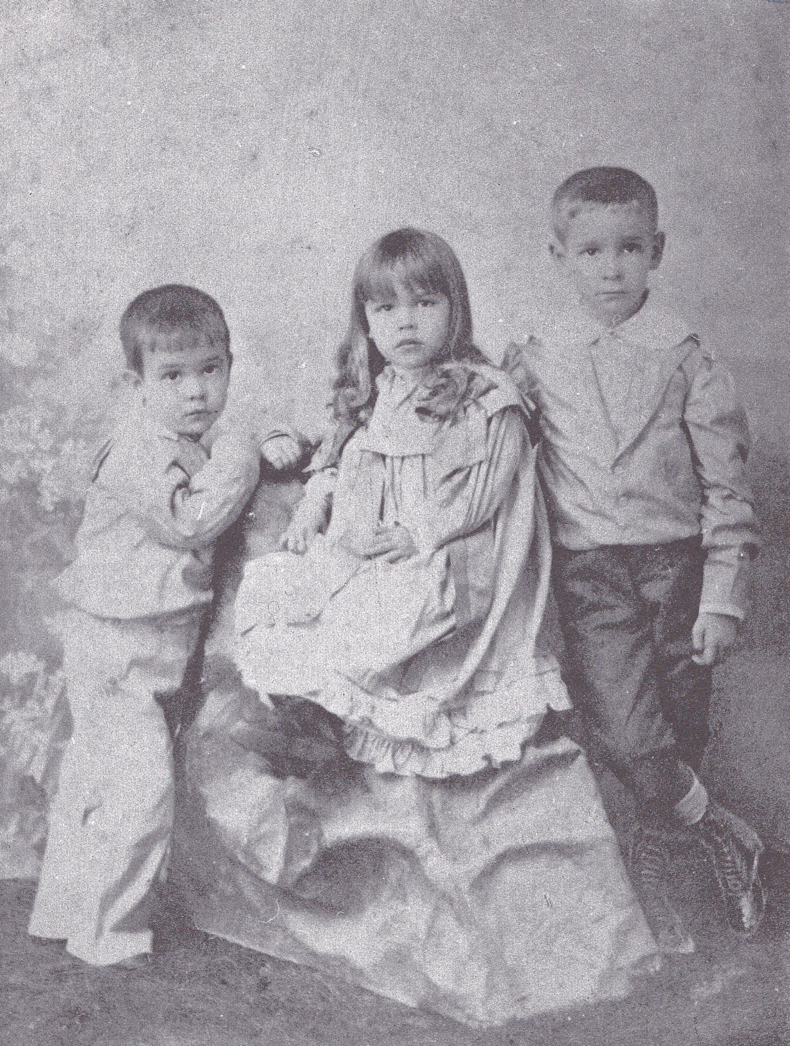 Caridad Mercader y sus hermanos, hacia 1895. Publicado en Ramón Mercader, mi hermano (de Luis Mercader y Germán Sánchez, 1990), página 35